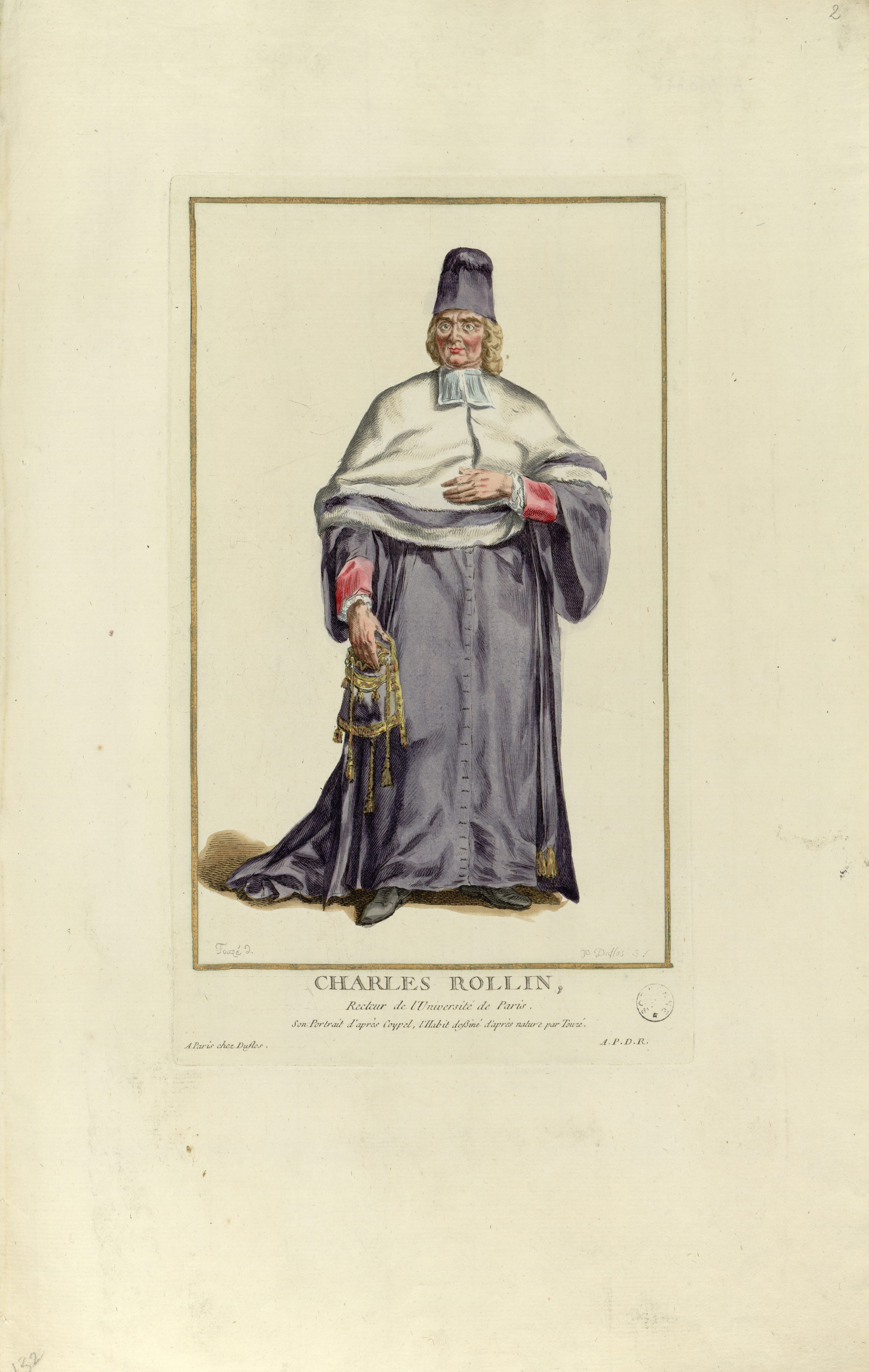 Estampe